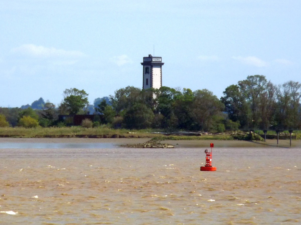 phare de Patiras, Saint-Androny, Gironde, France; vu depuis Pauillac